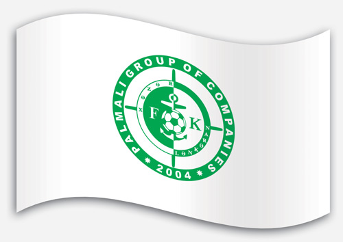 "Xəzər Lənkəran" futbol klubunun rəsmi bayrağı